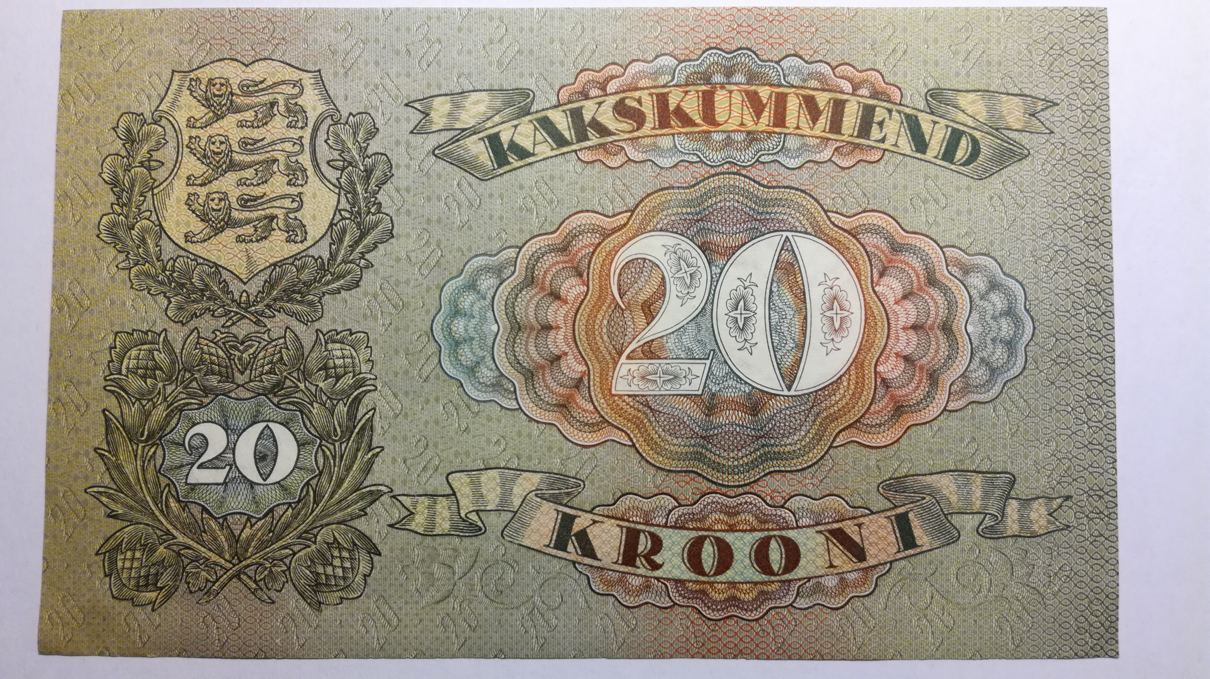 Pildil on 1932. aasta 20 kroonise tagakülg.